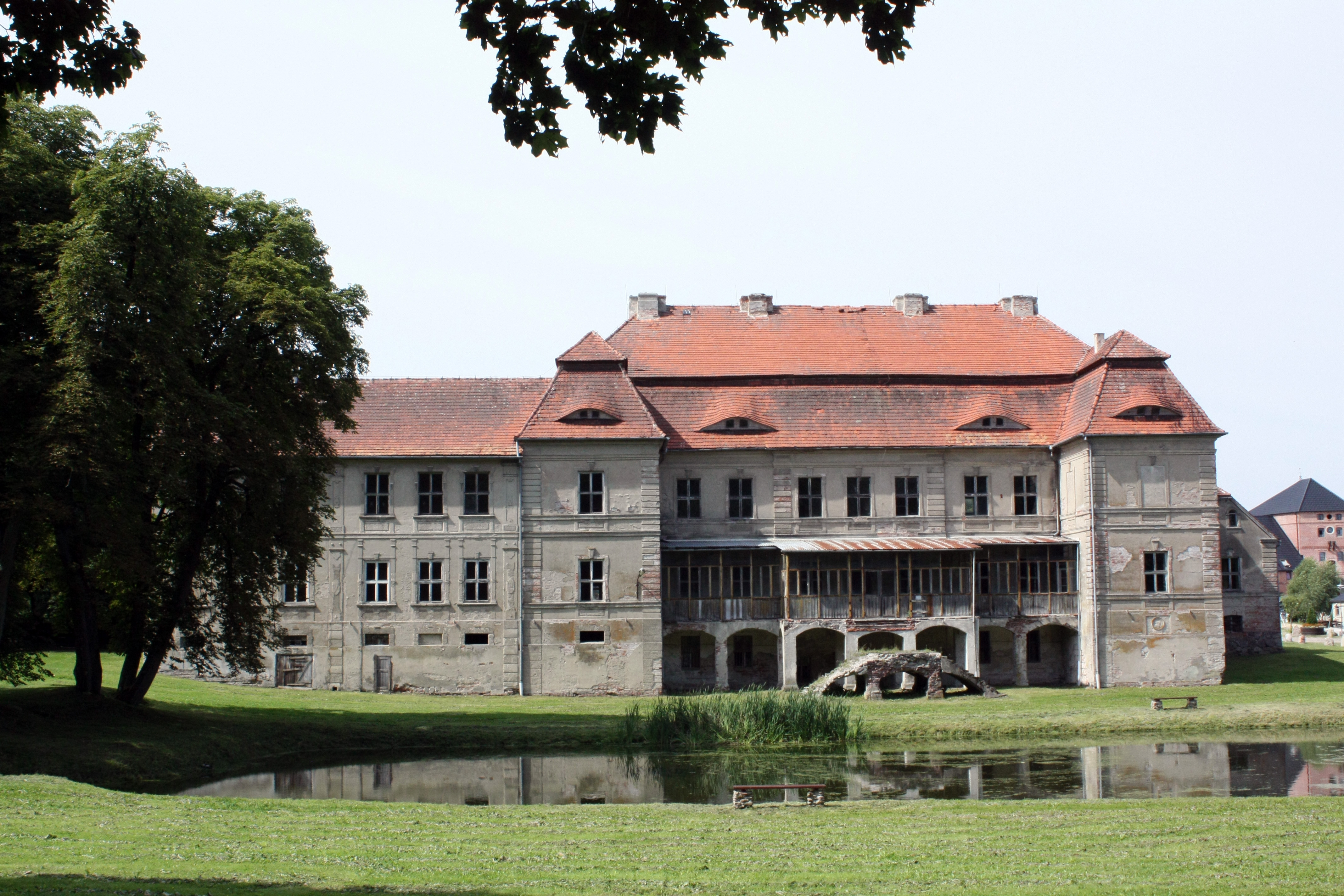 Siemczyno, pałac, 1722-1726, 1796, pocz. XIX